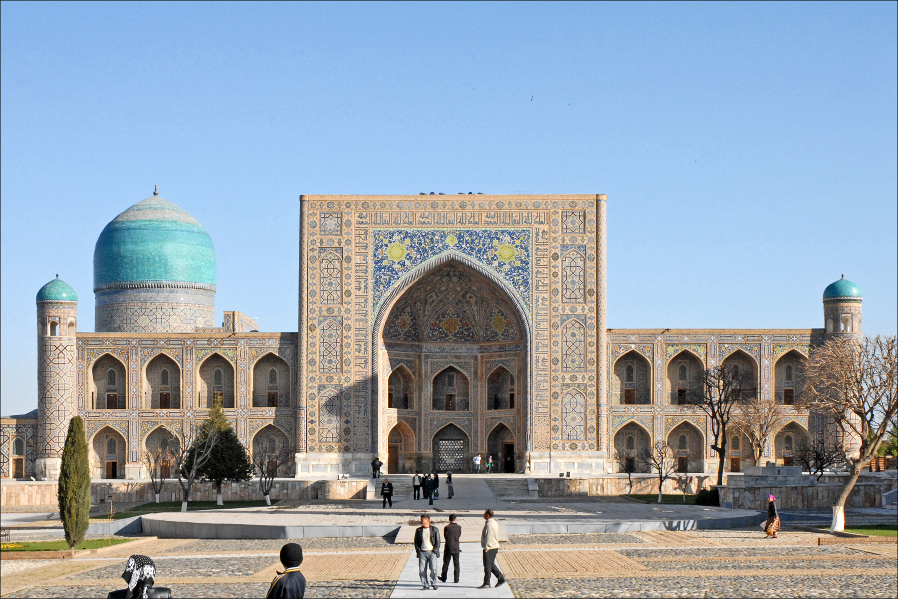 Le Registan est le coeur de la clté historique de Samarcande, une des principales villes de l'ancienne Route de la Soie. Le Régistan est constitué aujourd'hui d'une grande esplanade bordée de trois majestueuses madrasas décorées de majoliques aux motifs géométriques : Oulough Begh (à gauche), Chir Dor (à droite), Tilla Kari (en face). Le point de vue (lieu de la prise de photo panoramique, le matin) a été dégagé, au début du 20ème siècle par les soviétiques, de nombreux édifices qui encombraient le lieu, les grandes madrasas ont été restaurées. La madrasa Oulough Begh est la plus ancienne, elle a été construite entre 1417 et 1420. Elle est entourée de deux minarets de 33 m. Dès son ouverture, elle a été la plus grande université musulmane d'Asie centrale, sous l'impulsion d'Oulough Begh, on y enseignait le Coran mais aussi des matières non religieuses comme l'astronomie ou les mathématiques, ce qui n'a pas duré très longtemps car le fanatisme religieux a repris le dessus. La madrasa Chir Dor, à droite, a été construite entre 1619 et 1635. Le décor de son grand portail est célèbre car il comprend des représentations d'animaux (tigre-lion portant le soleil, symbole de l'ancien zoroastrisme, la religion précédent l'Islam) ce qui est normalement interdit par l'Islam. Les deux coupoles turquoises et vertes, en bulbe cannelé, sont caractéristiques du style architectural de Samarcande. La madrasa Tilla Kari (au fond, au nord) est structurellement différente des deux autres. Hormis sa façade plus longue montrant les cellules des étudiants de la madrasa, (dans les autres édifices, les cellules donnent sur la cour intérieure), elle possède une coupole bleue qui couvre la mosquée se trouvant à l'intérieur du bâtiment. Elle a été construite entre 1646 et 1659. article de Wikipedia